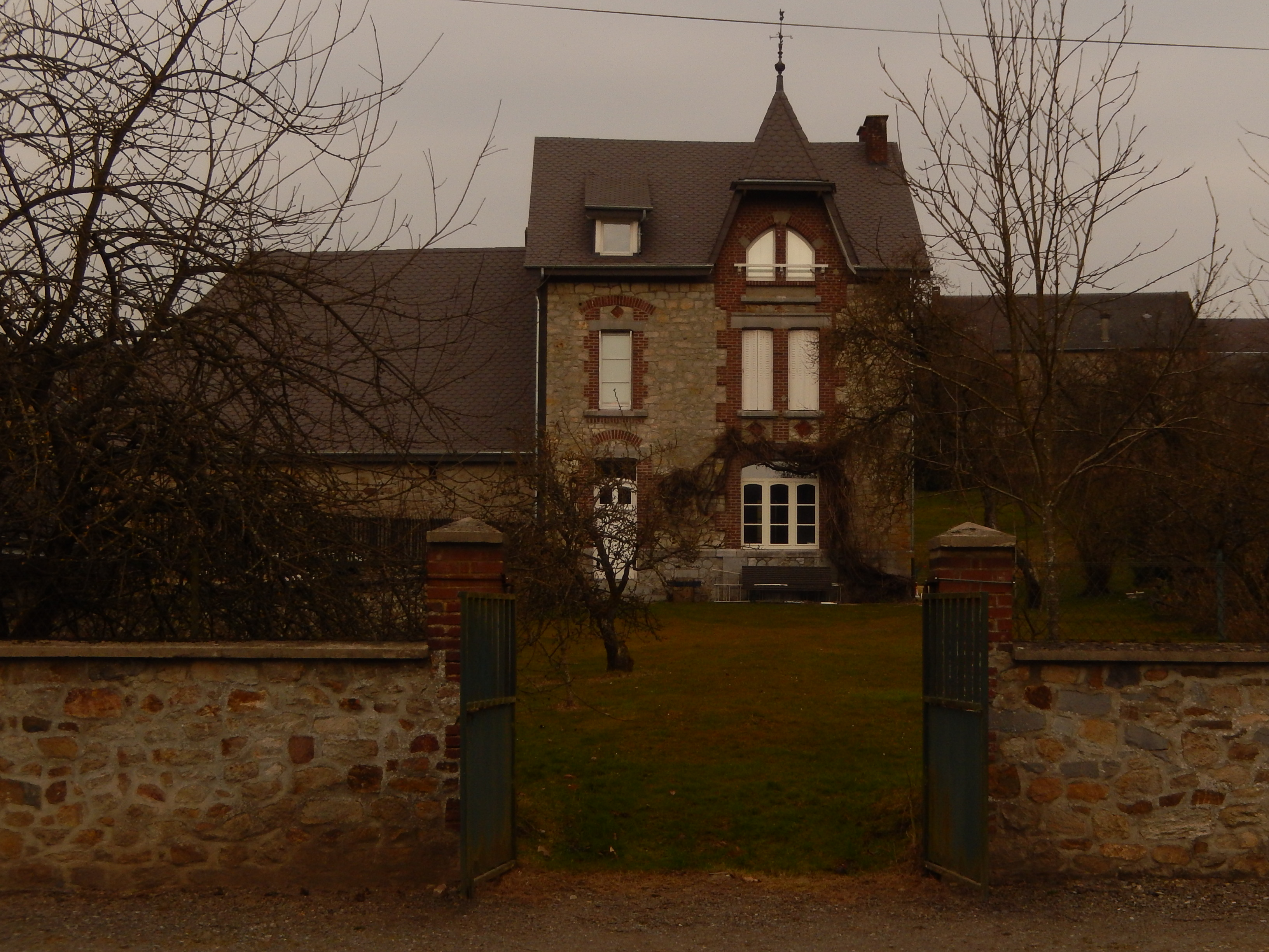 Maison de Maria Delhalle, Hargnies Ardennes